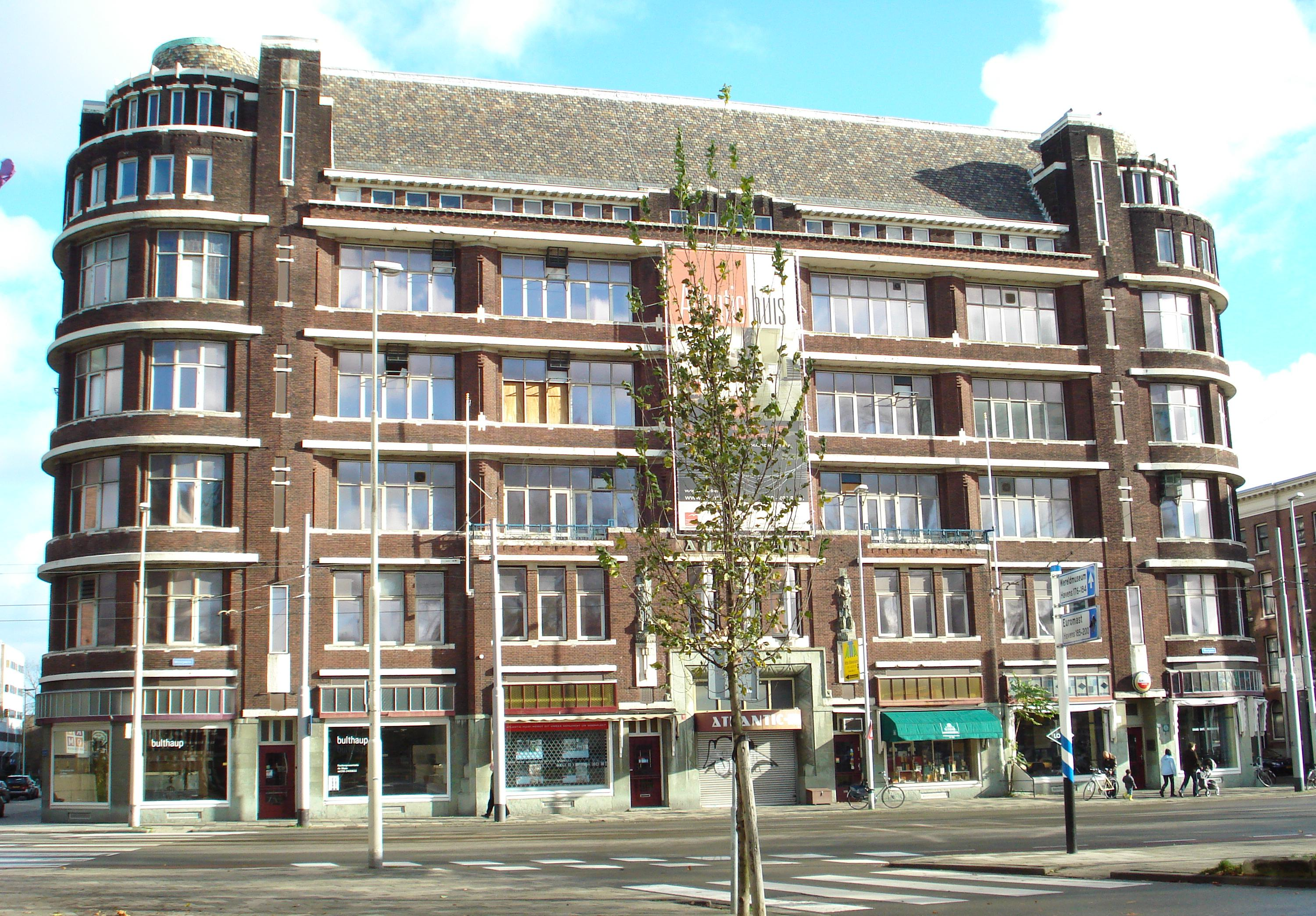 Rotterdam, Atlantichuis. Rijksmonument.